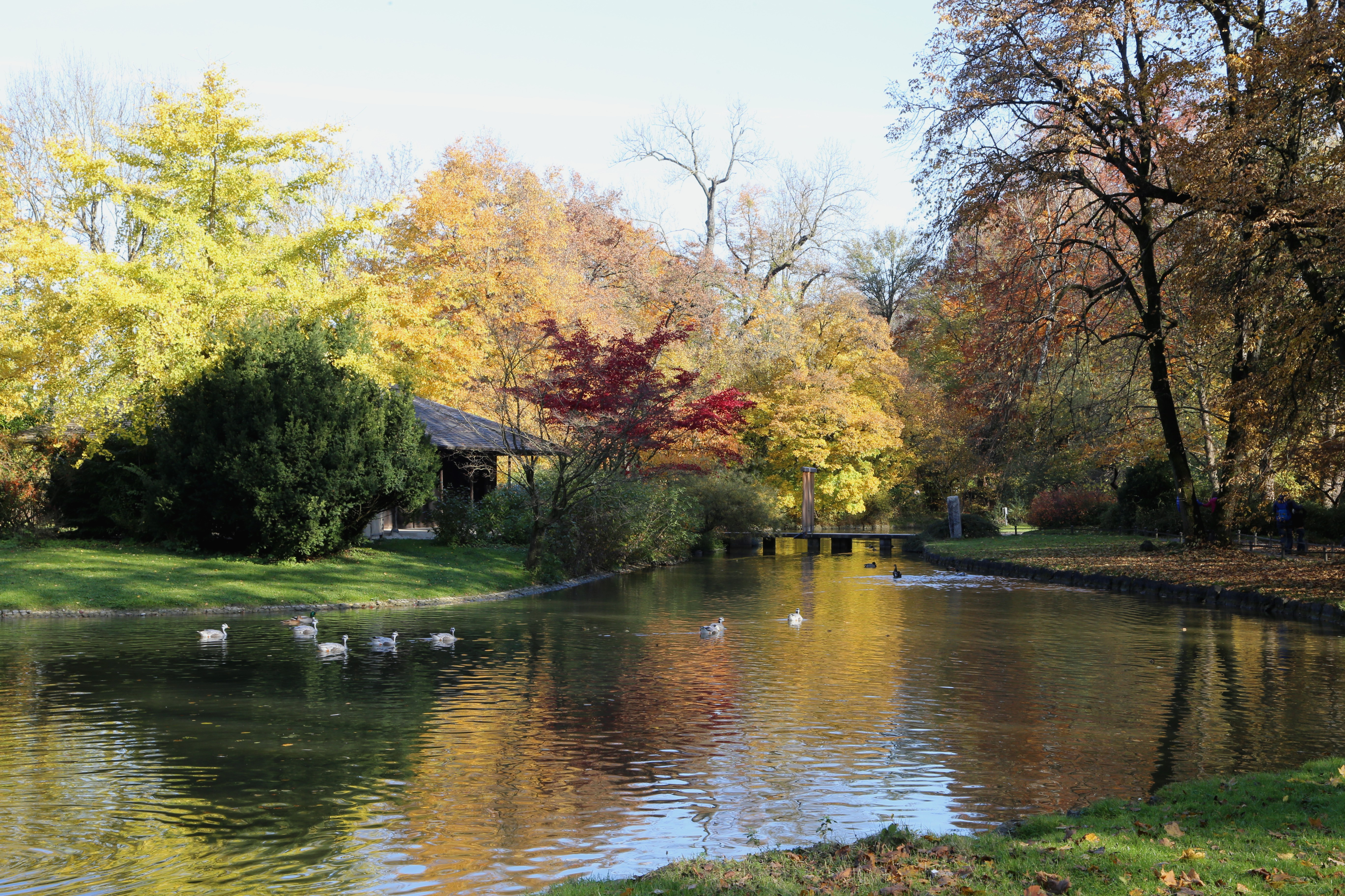 Herbst im Englischen Garten, München